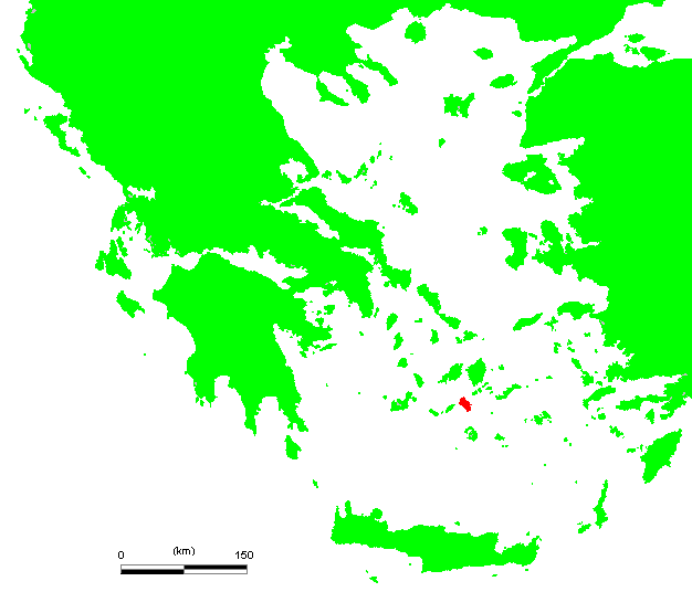 GR Ios.PNG (Greek island)